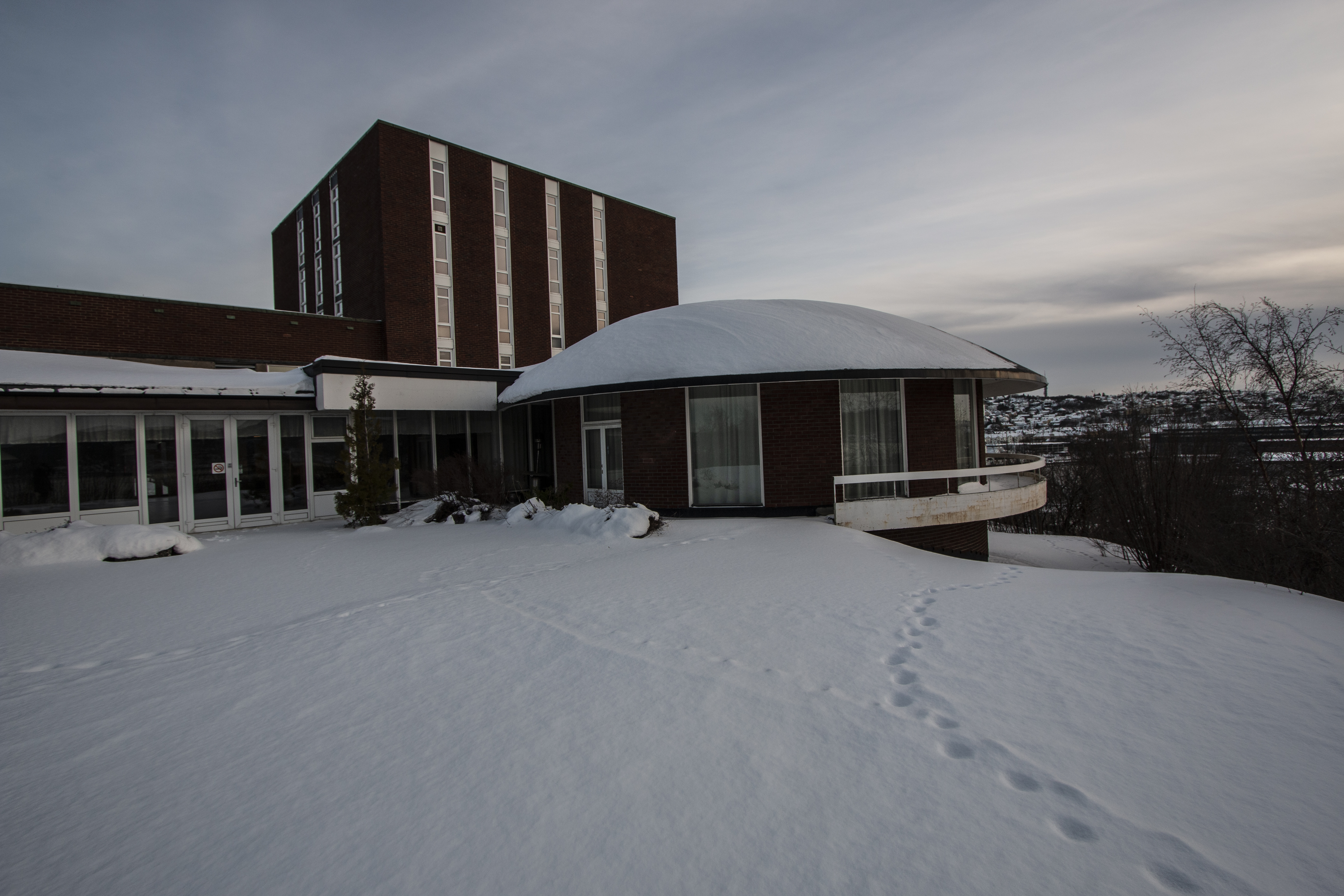 Ladejarlen Videregående skole fotografert 07.02.2019 av Iver Daaland Aase i forbindelse med bokprosjektet: Trondheims glemte storstue. Bildet viser skolens "Bakgård" ved tidligere kantine og serveringsareal i skolens søndre fløy